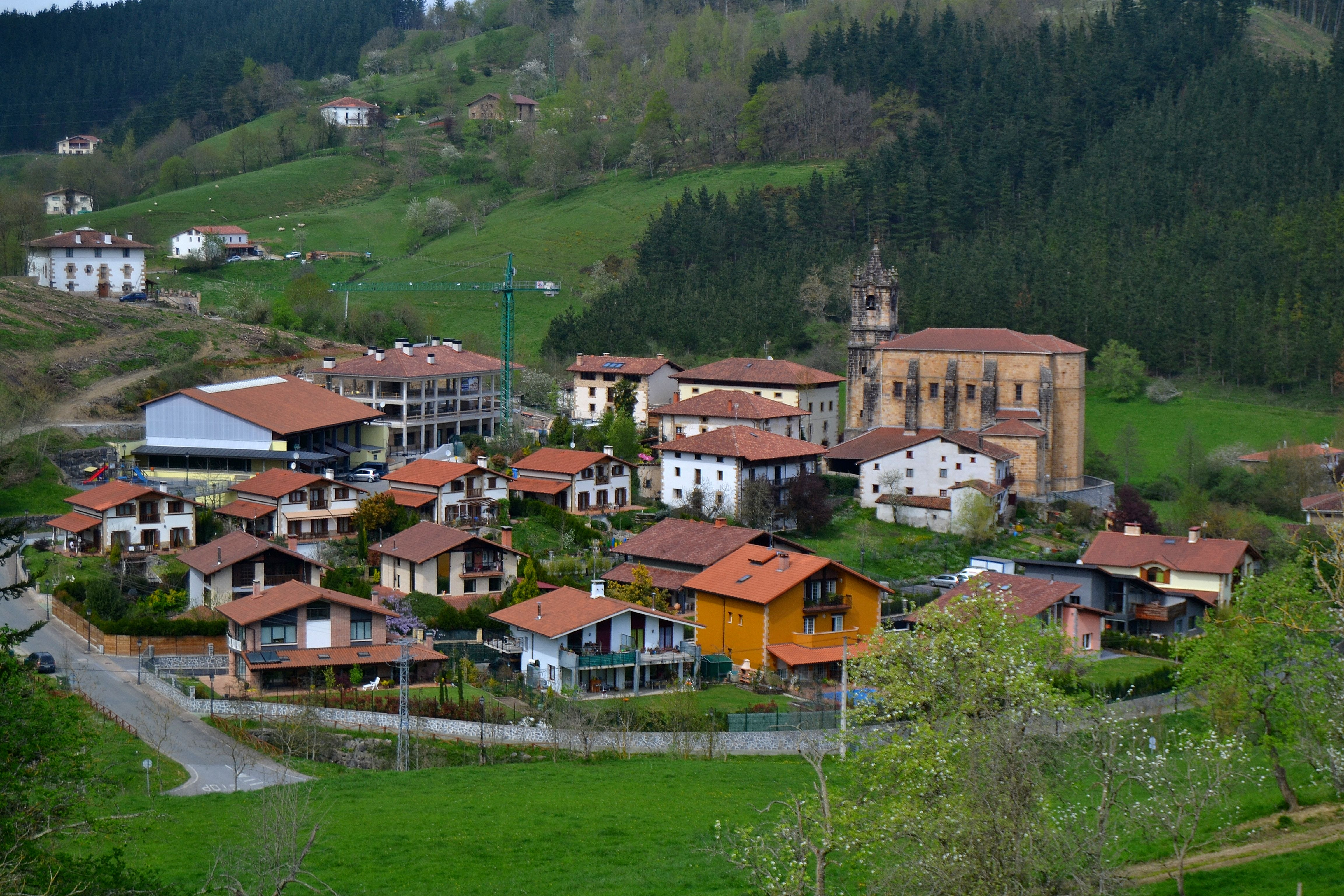 Mutiloako herrigunea. Goierri, Gipuzkoa. Euskal Herria. The bourg of Mutiloa. Goierri, Gipuzkoa. Basque Country.